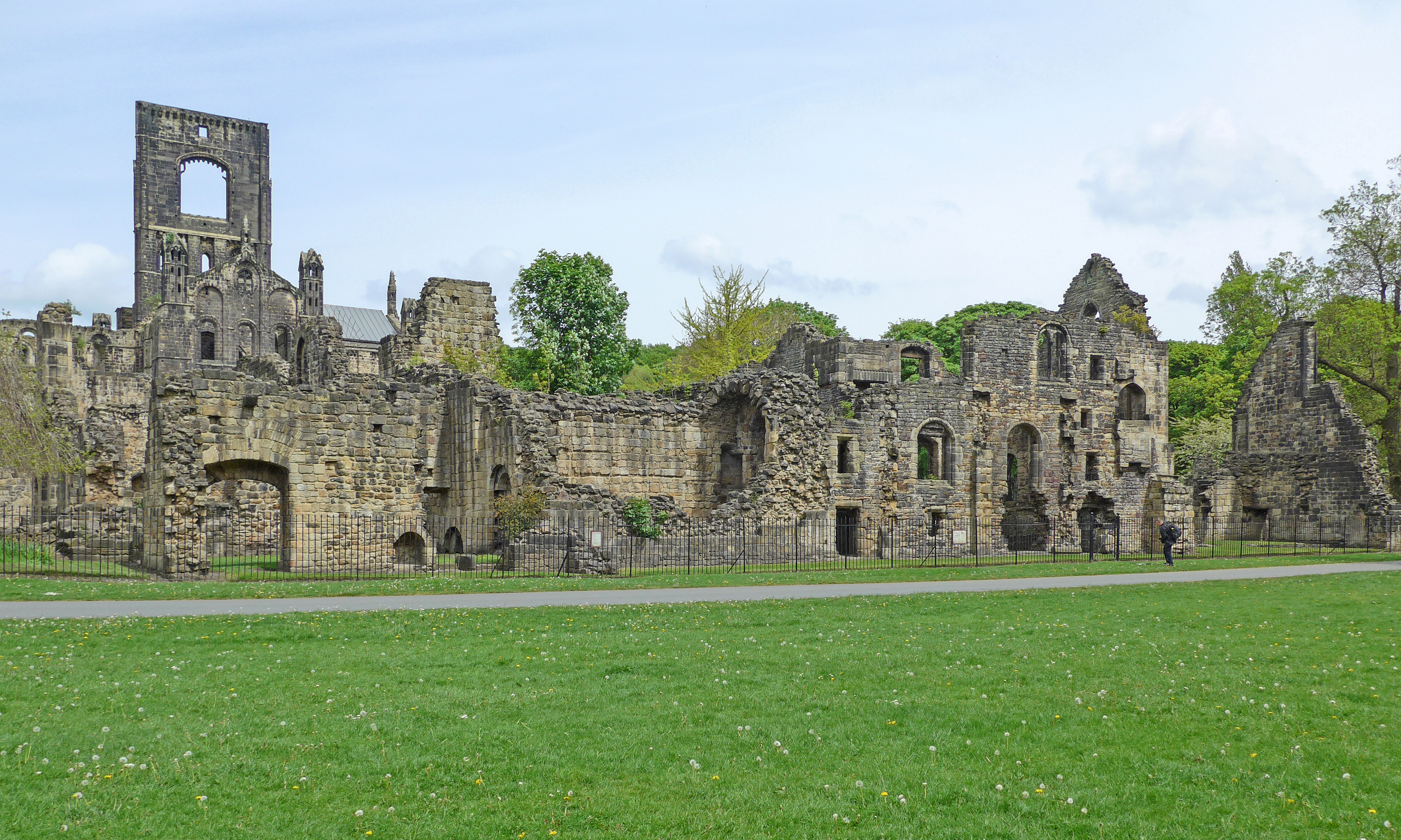 Kirkstall Abbey